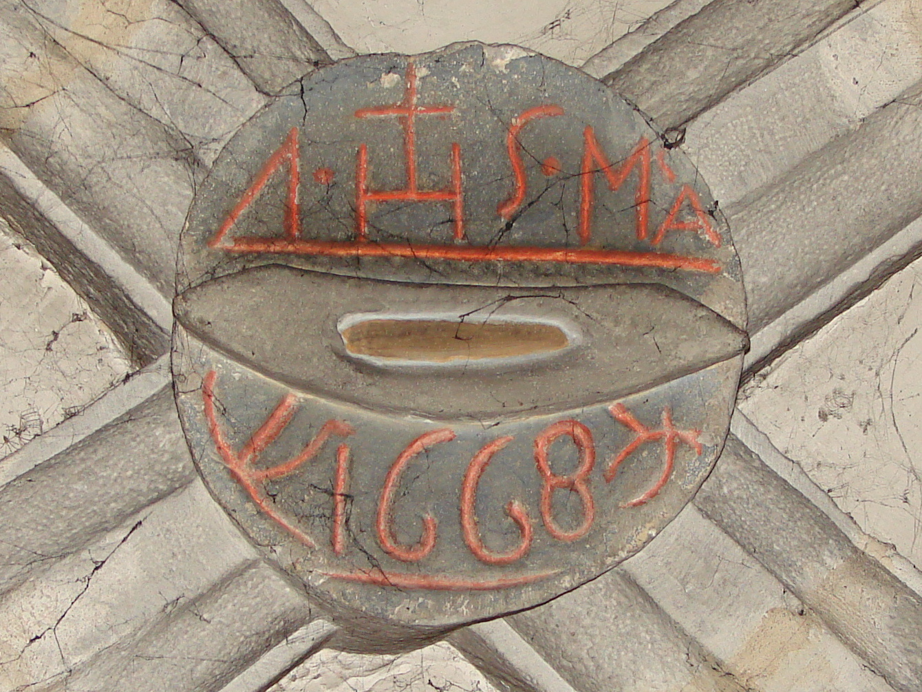 Clef de voute avec navette, chapelle des tisserands, église de Saint-Rambert-en-Bugey